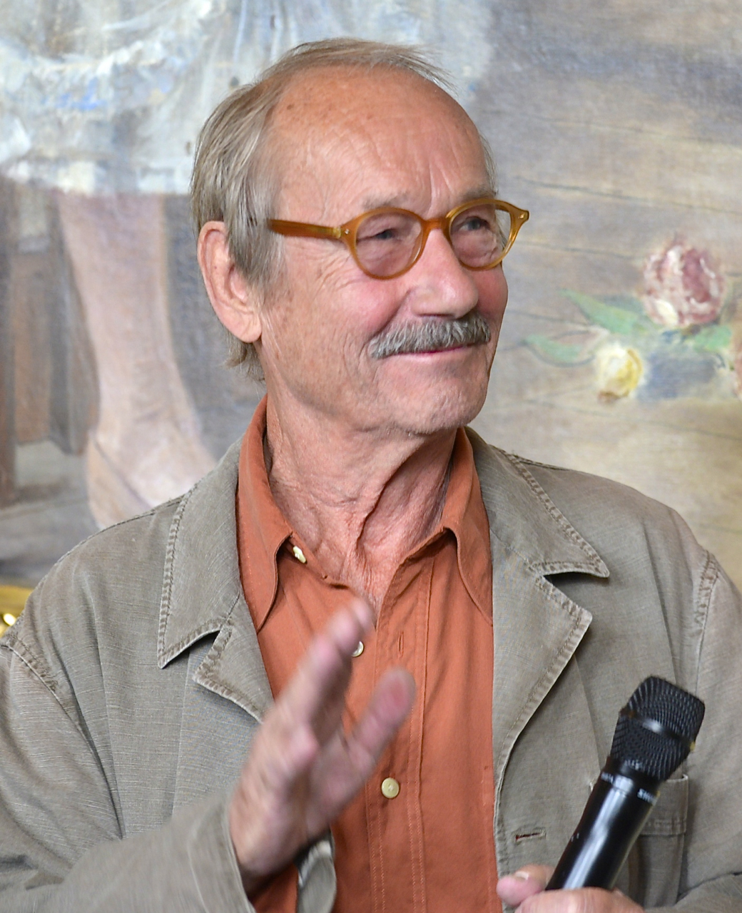 Gösta Ekman under Dramatens höstsamling 2014.